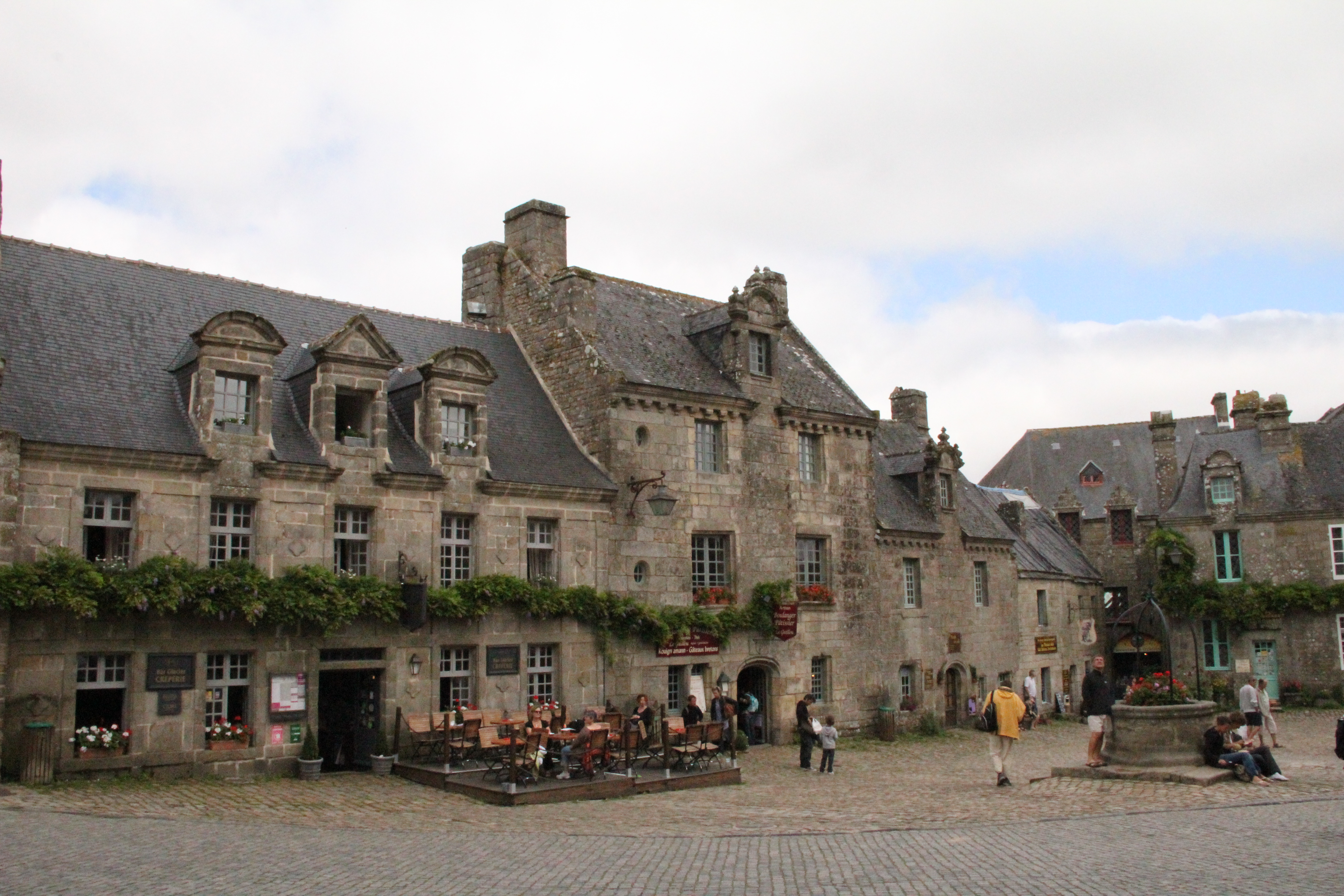 Vue du parvis de l'église